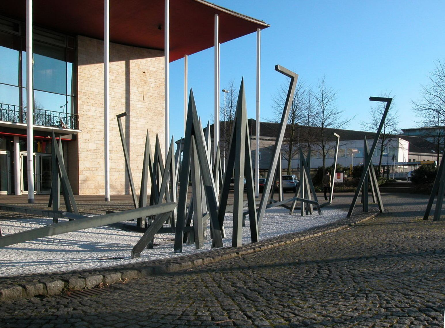 Die "Panzersperre" vor der Stadthalle in Mülheim Standort: 51°25′38.45″N 6°52′25.85″E / 51.4273472°N 6.8738472°E